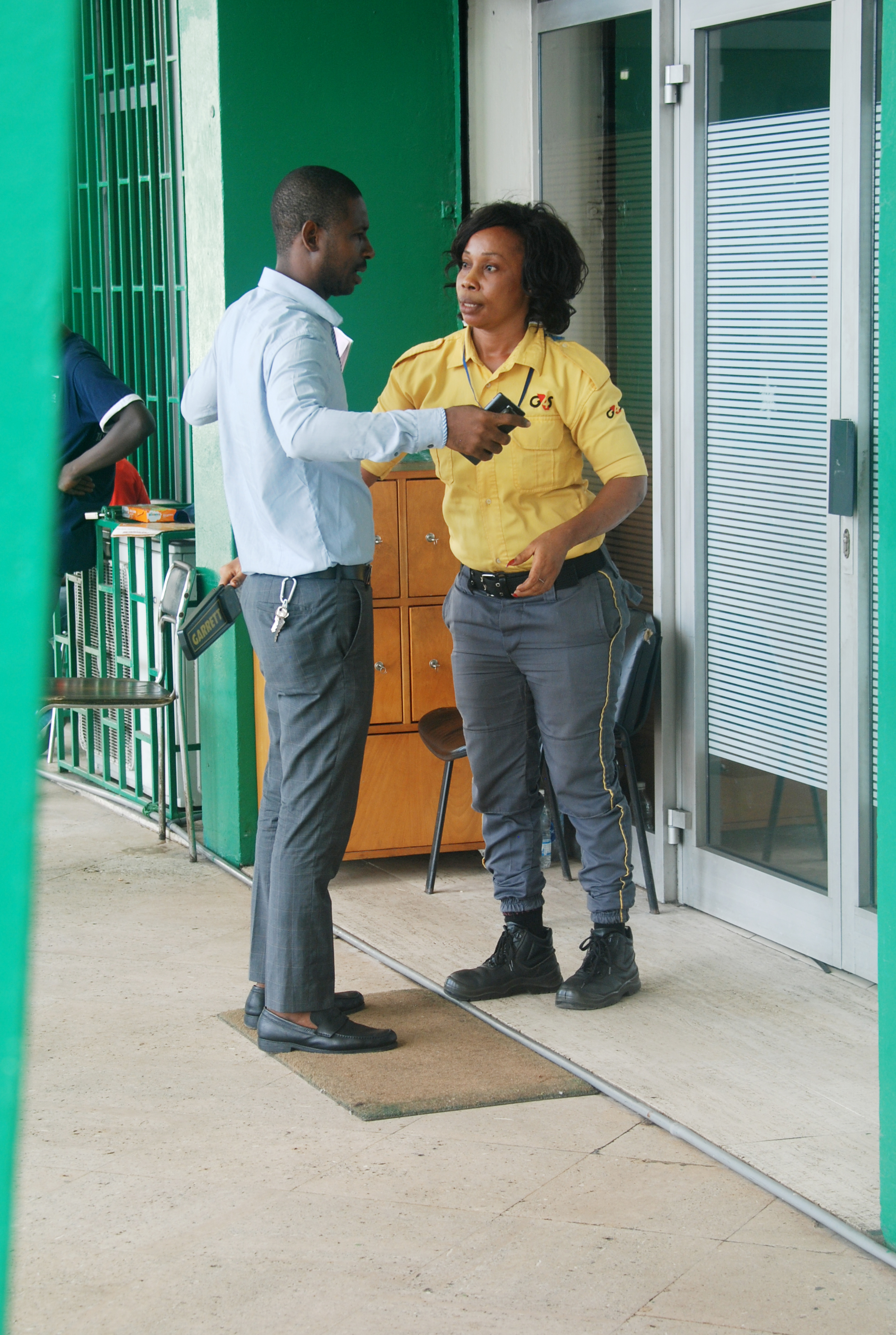 Une femme agent de sécurité fouillant un usager d'une entreprise dans la commune du Plateau, à Abidjan. This is an image of "African people at work" from Ivory Coast